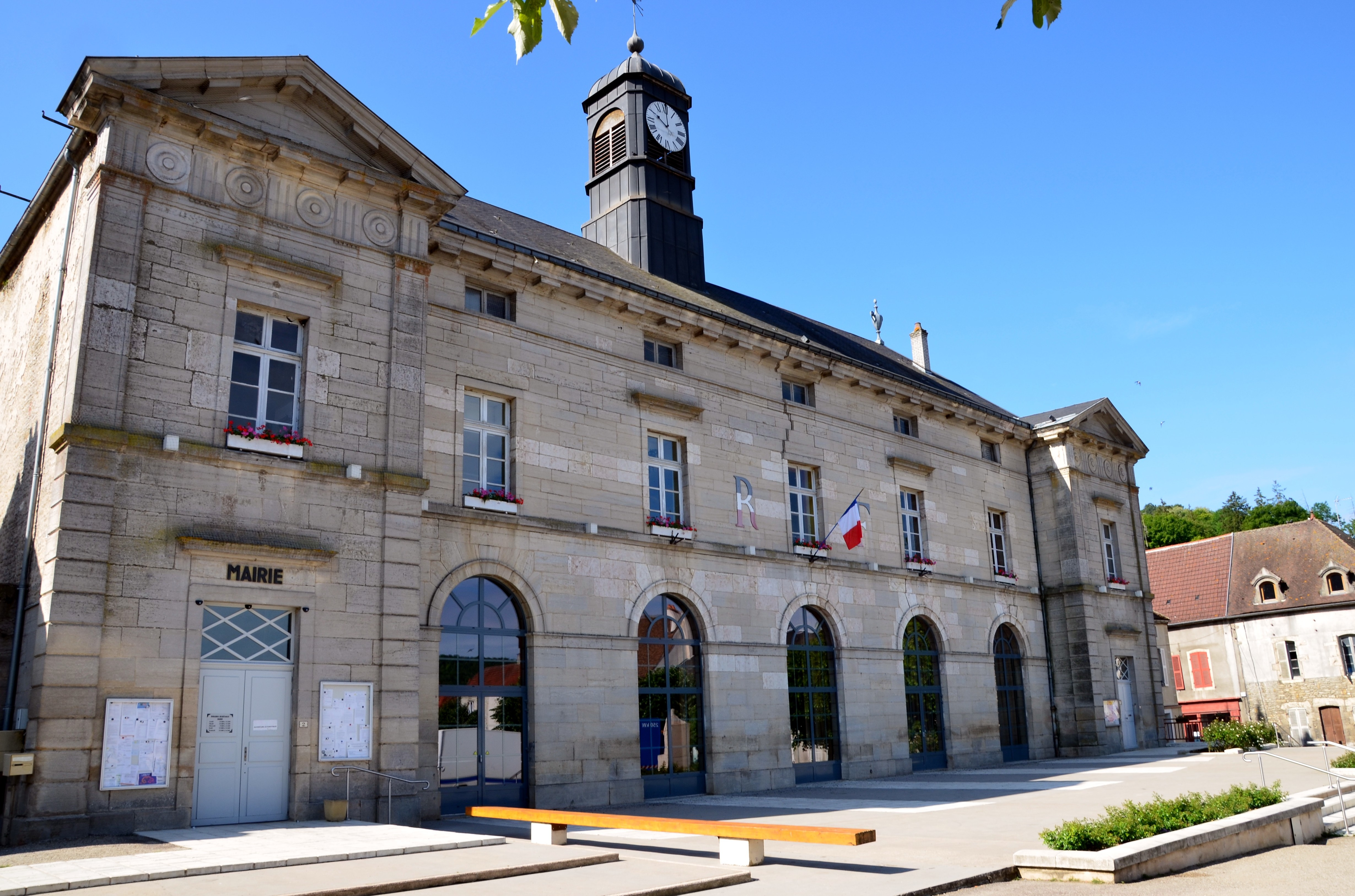 Bâtiment de la mairie et salle des fêtes de Bligny-sur-Ouche (Côte-d'Or, France).